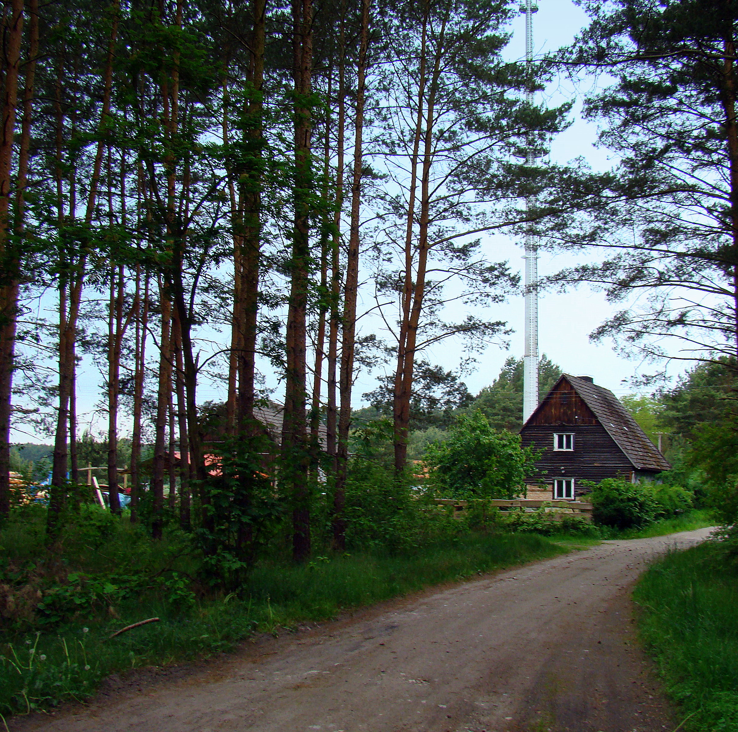 Mszczuje, część zabudowań (Gmina Nowe Warpno, Województwo zachodniopomorskie), Polska